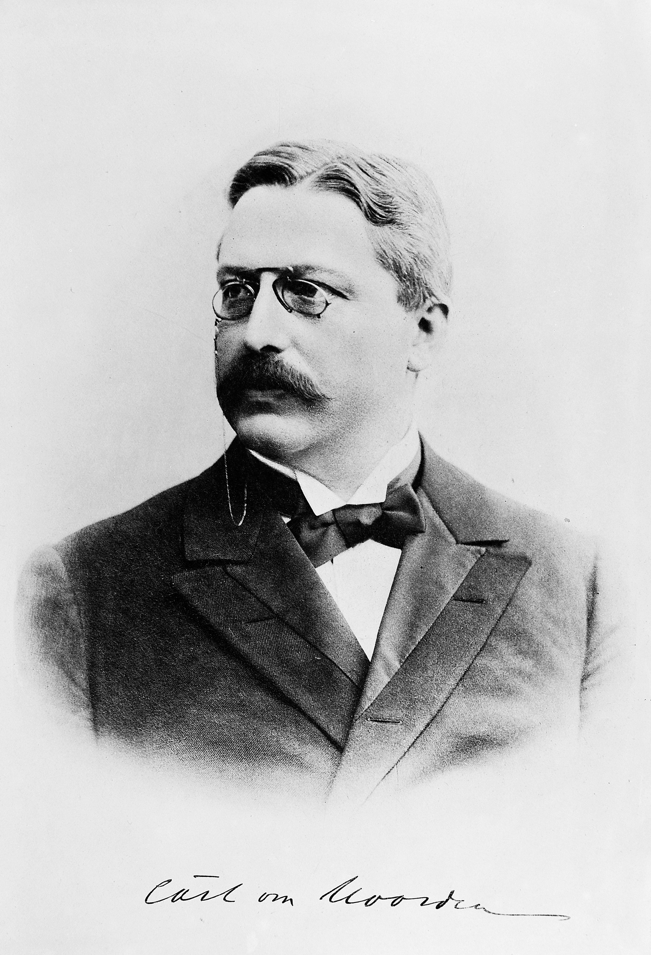 Carl Harko von Noorden, important worker on metabolism. Wellcome Images Keywords: Carl Harko Noorden, von